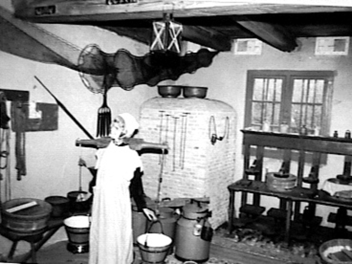 Crimpenerhof: interieur museumboerderij "Crimpenerhof" SCHENK 1981 TB KRIMPENW (opmerking: Deze afbeelding hebben wij helaas alleen in deze lage resolutie.)